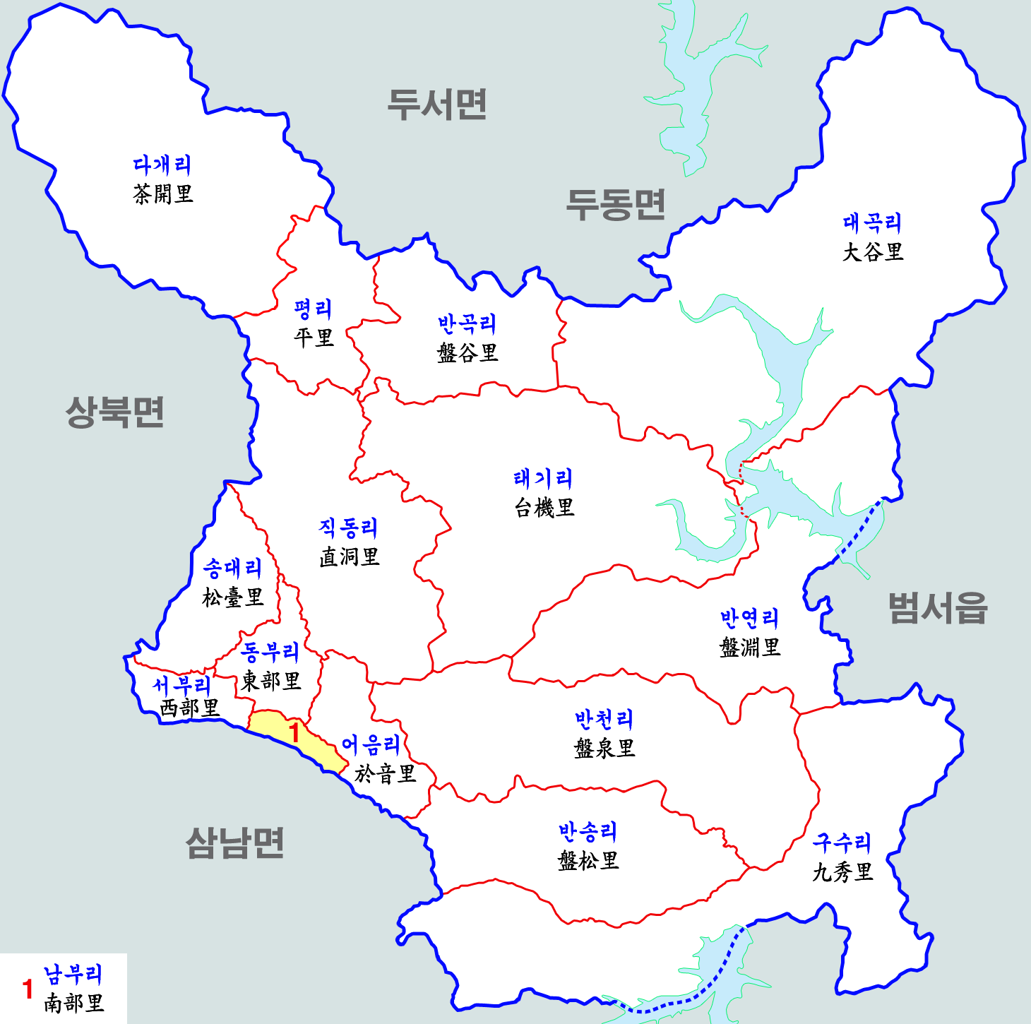 울주군 언양읍 행정구역도